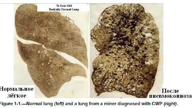 Обеспыливание при добыче угля в шахах США. Фиг. 1.1 Лёгкое нормального человека и человека, болевшего пневмокониозом